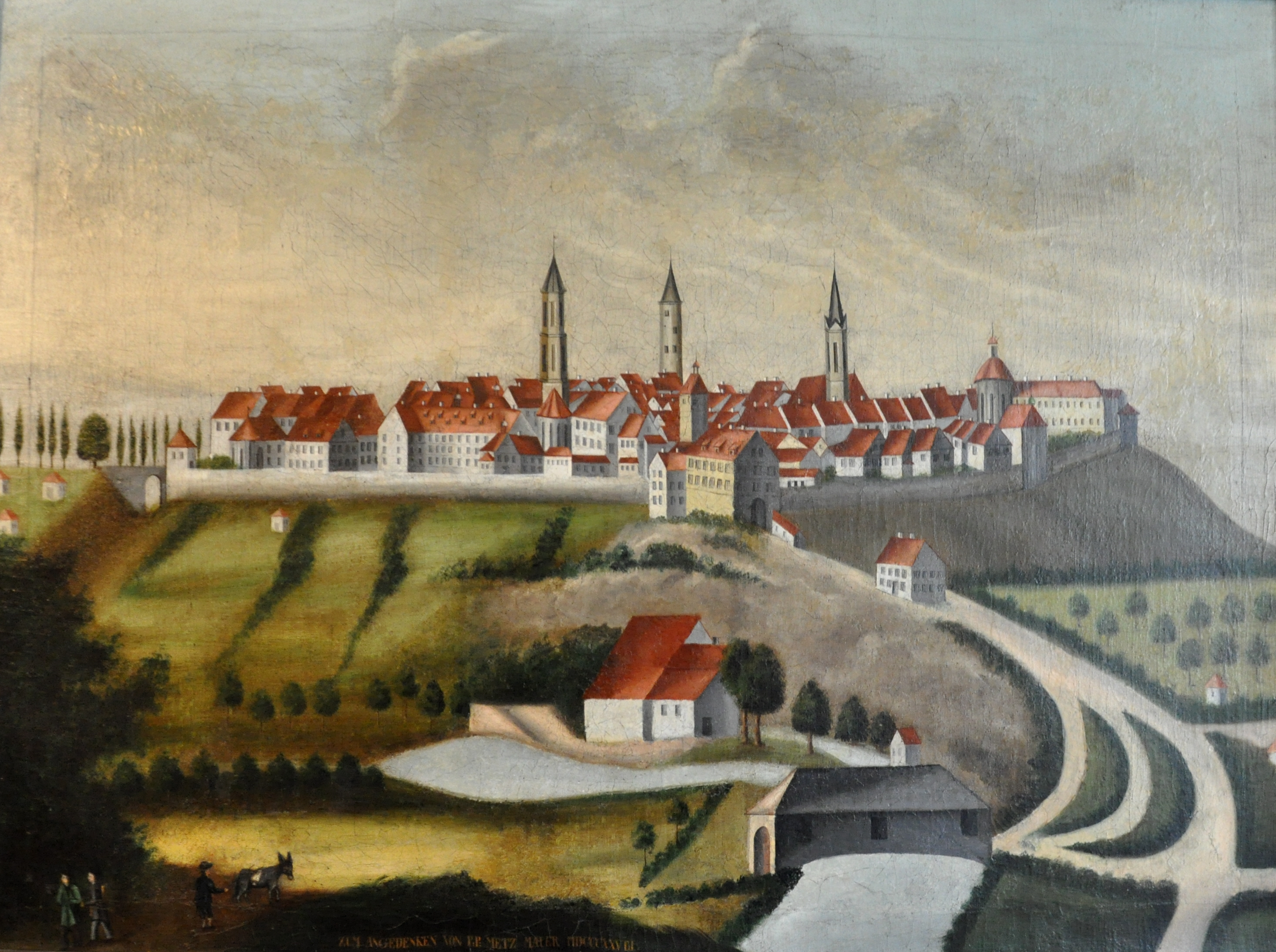 Rottweil von Osten, 1828, Stadtmuseum Rottweil